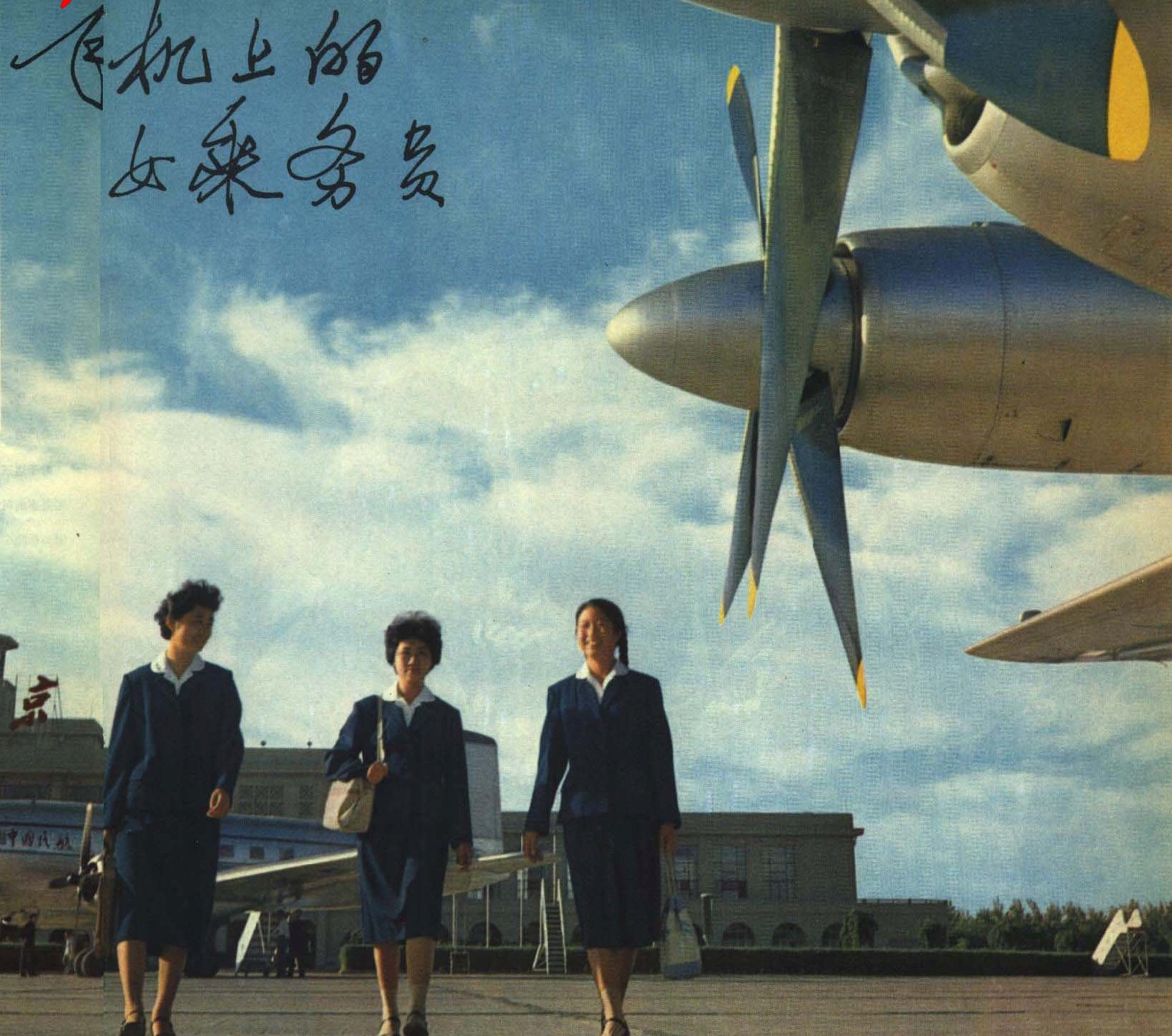 1963-11 1963 飞机乘务员